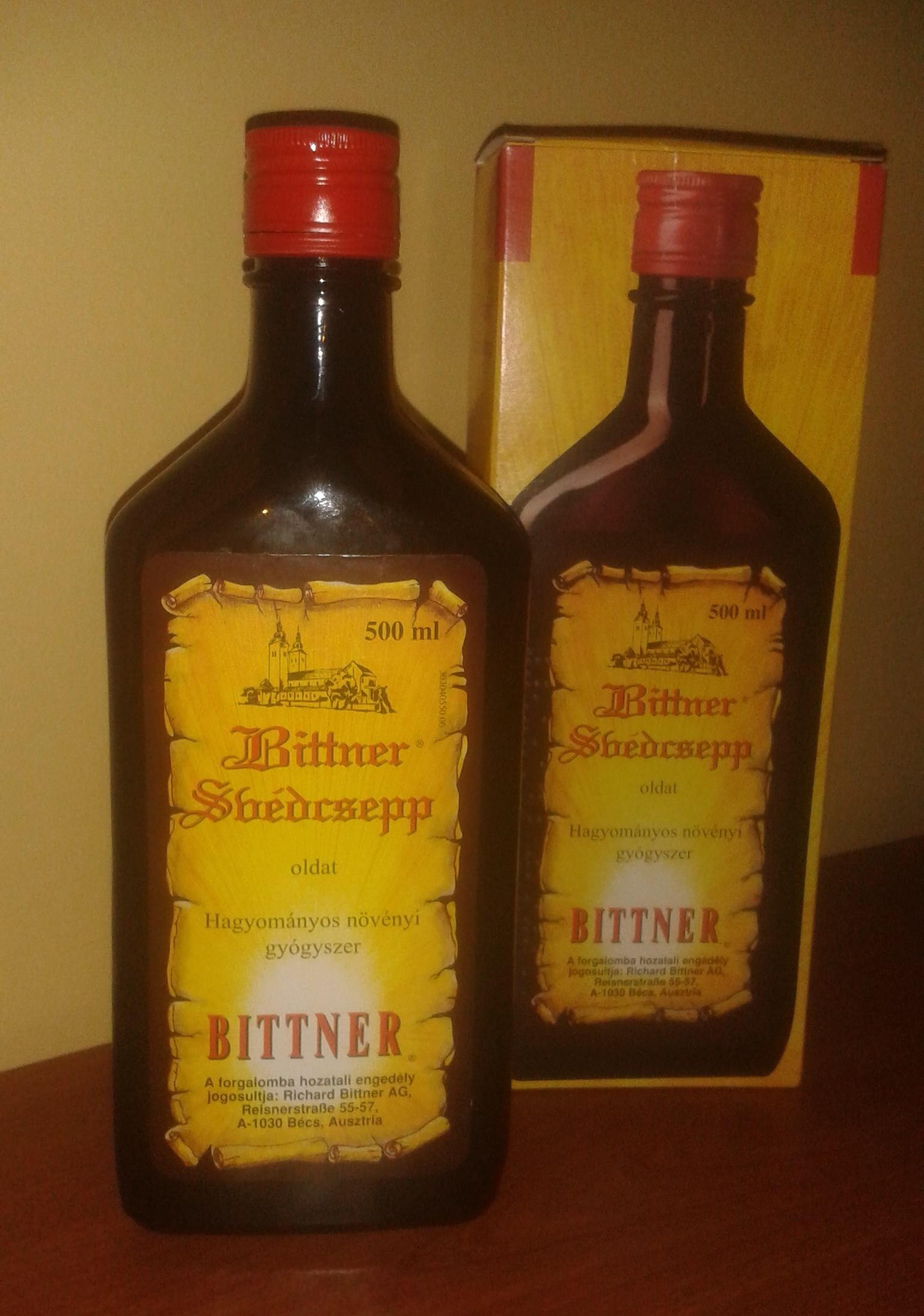 Српски (ћирилица): Шведска Гранчица, оригинално аустријско паковање